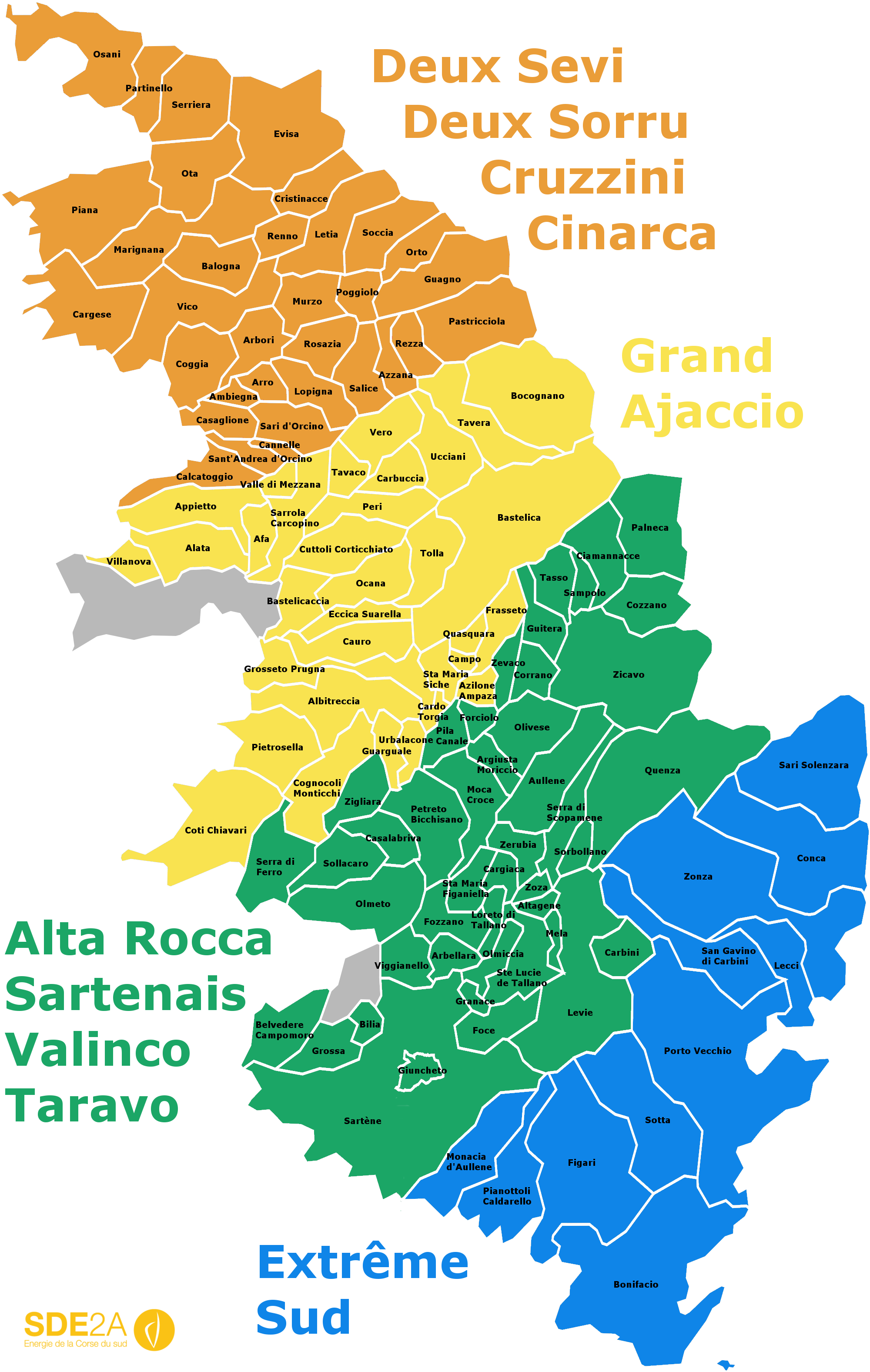 Carte du découpage des territoires du Syndicat départemental d'Energie de la Corse du Sud